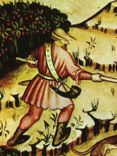 Tacuina sanitatis (XIV century) 7-svaghi cacciaTaccuino Sanitatis Casanatense 4182 cacciatore.